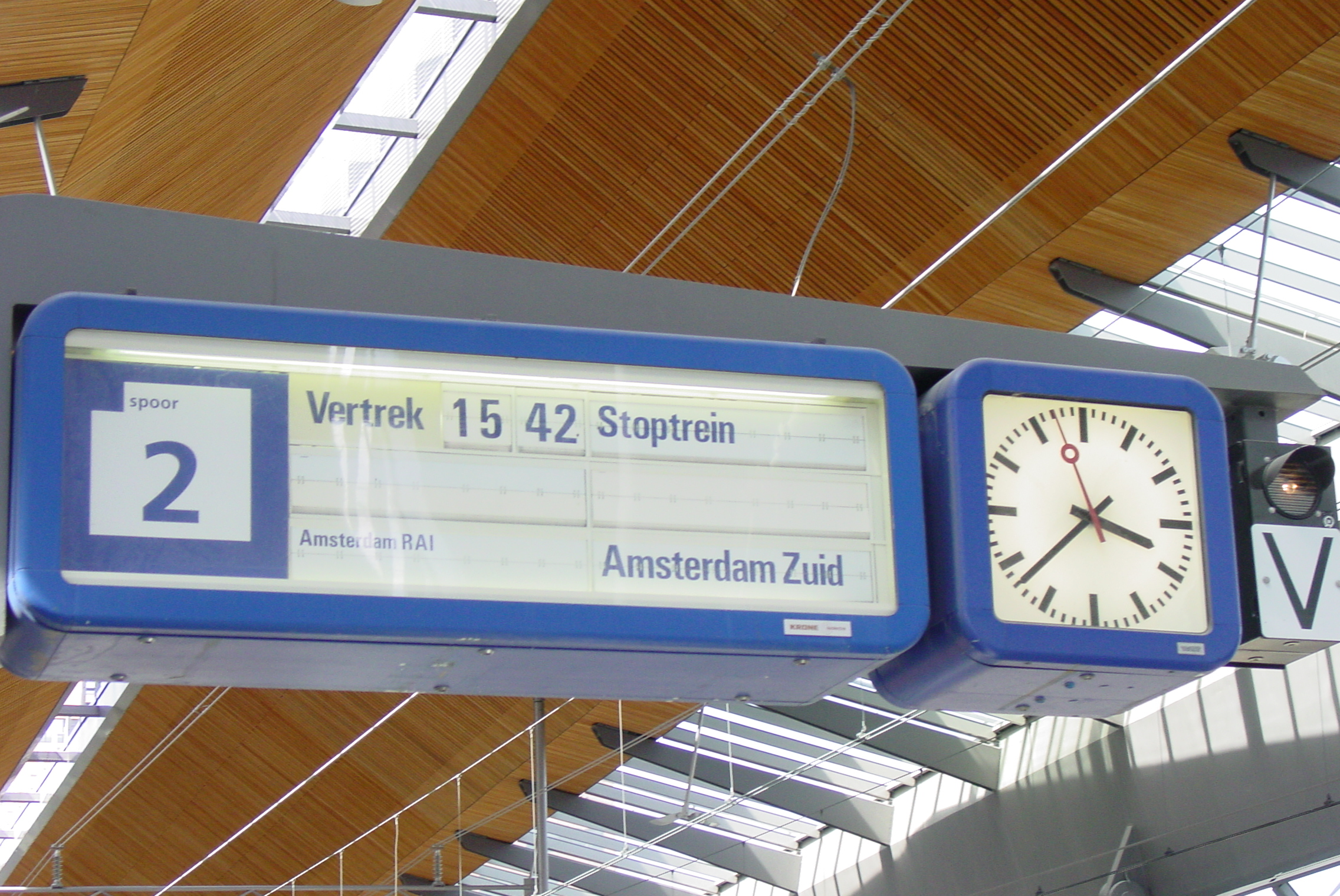 Een Centraal Bediende Treinaanwijzer op het station van Amsterdam Bijlmer ArenA